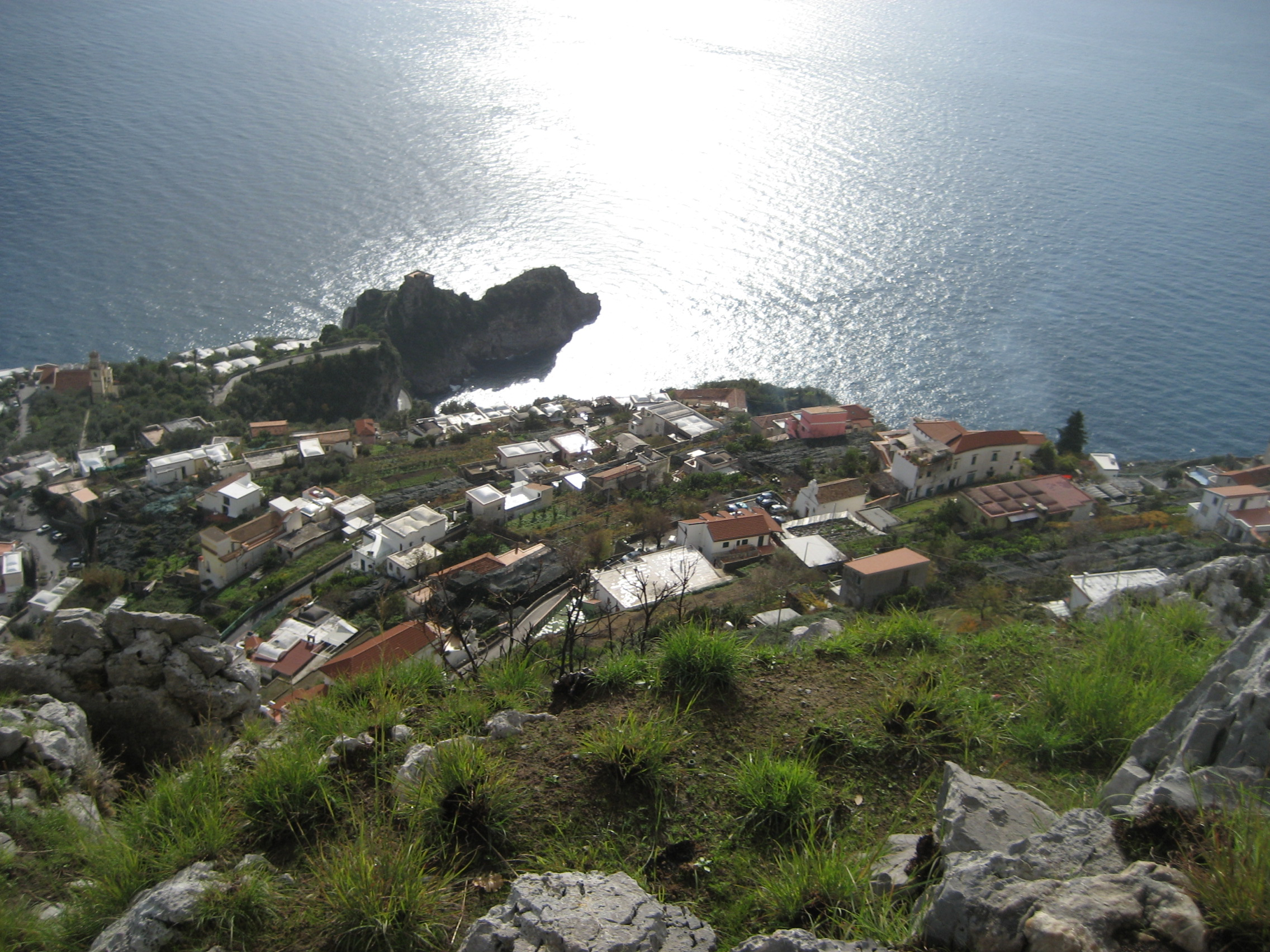 Conca dei Marini: Panorama dall'alto sul paese.